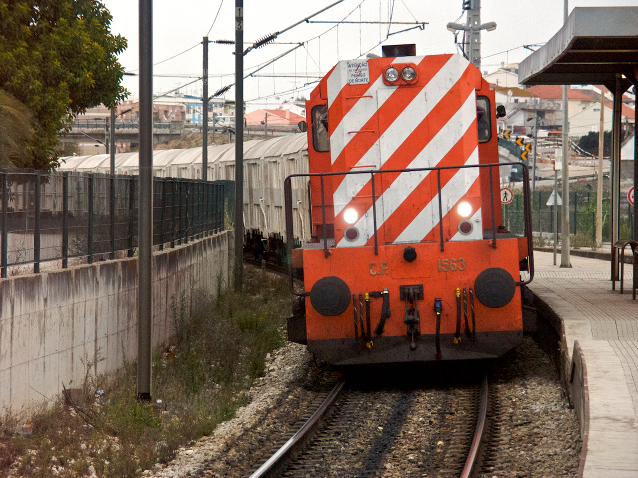 Tipo: Comboio de Transporte de Automóveis 69805 [Penalva - Setúbal • Mar] Local: Estação de Praias • Sado [Linha do Sul, PK 33] Data e hora: 3 de Novembro de 2008 [17h01] Material: Locomotiva 1563 + xx vagões CP Hccerrs